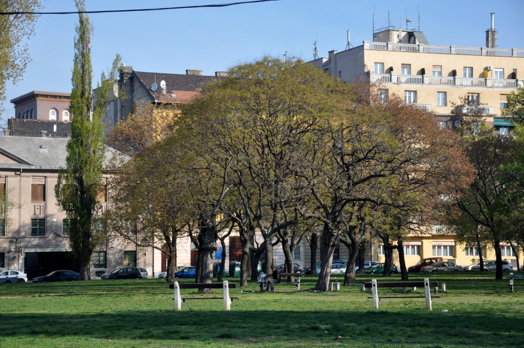 Teleki László Square, Budapest District VIII